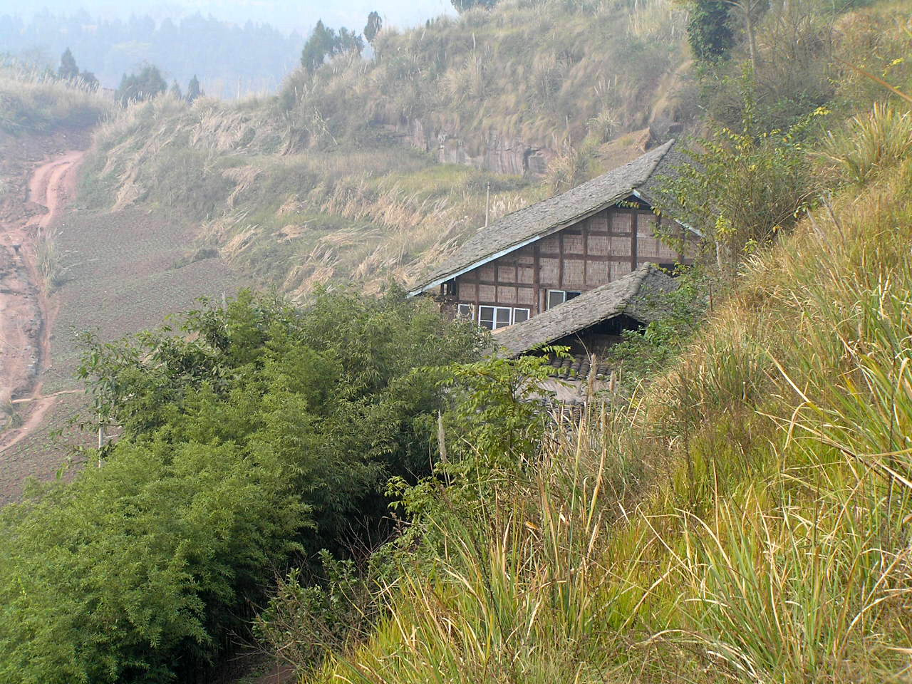 Anyue, Ziyang, Sichuan, China